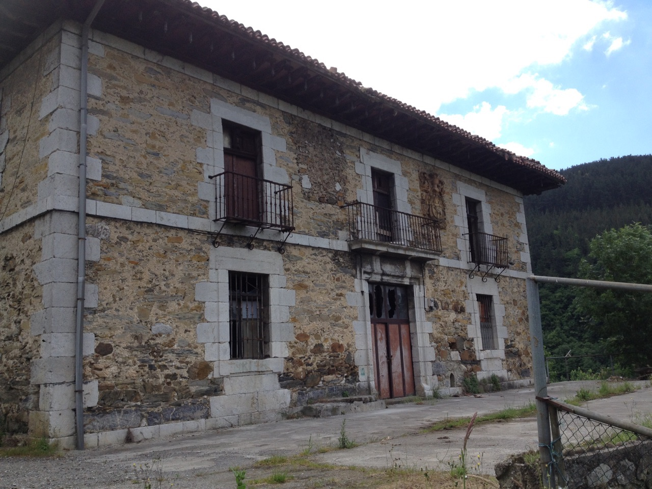 Oriar etxea